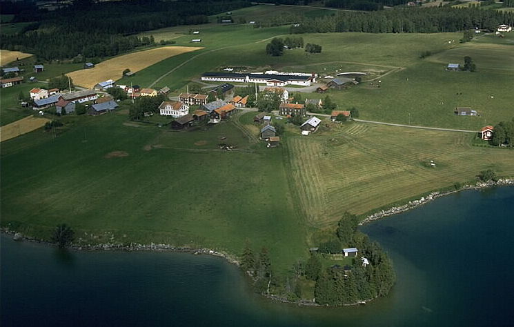 Motiv: Haxäng Nyckelord: Flygbilder, Riksintressen Kategori: JordbruksbyHaxäng